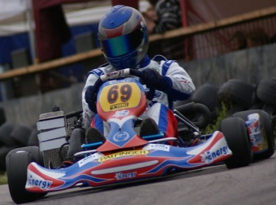 Kartingföraren Michael Andersson